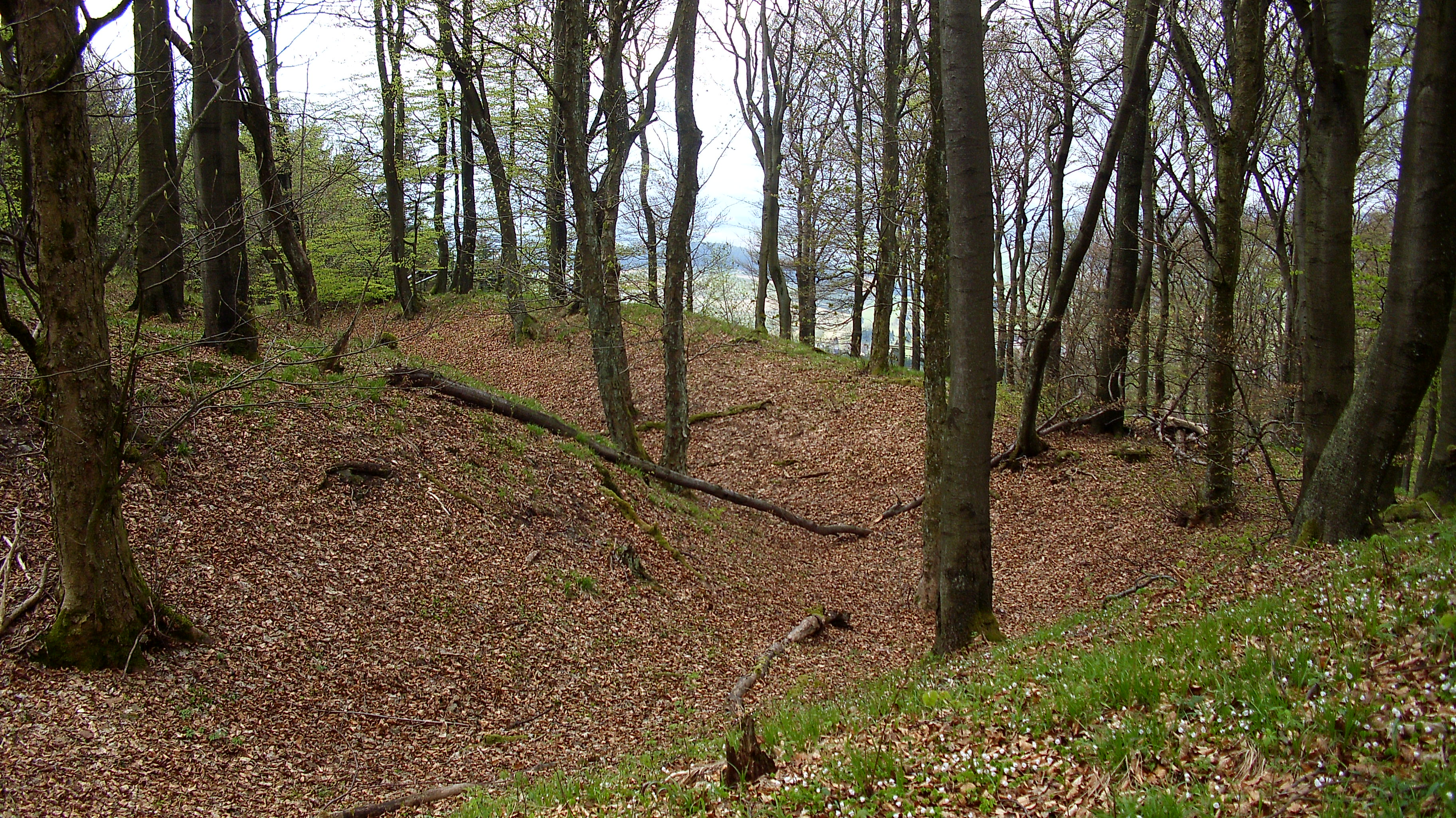 Wallanlage auf dem Schlossberg bei Küstelberg